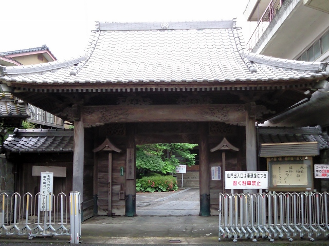 熊本県水俣市の源光寺（浄土真宗）。一向宗が禁止された薩摩から信仰を求めて来る信者を受け入れた「薩摩部屋」と呼ばれる部屋が残る。